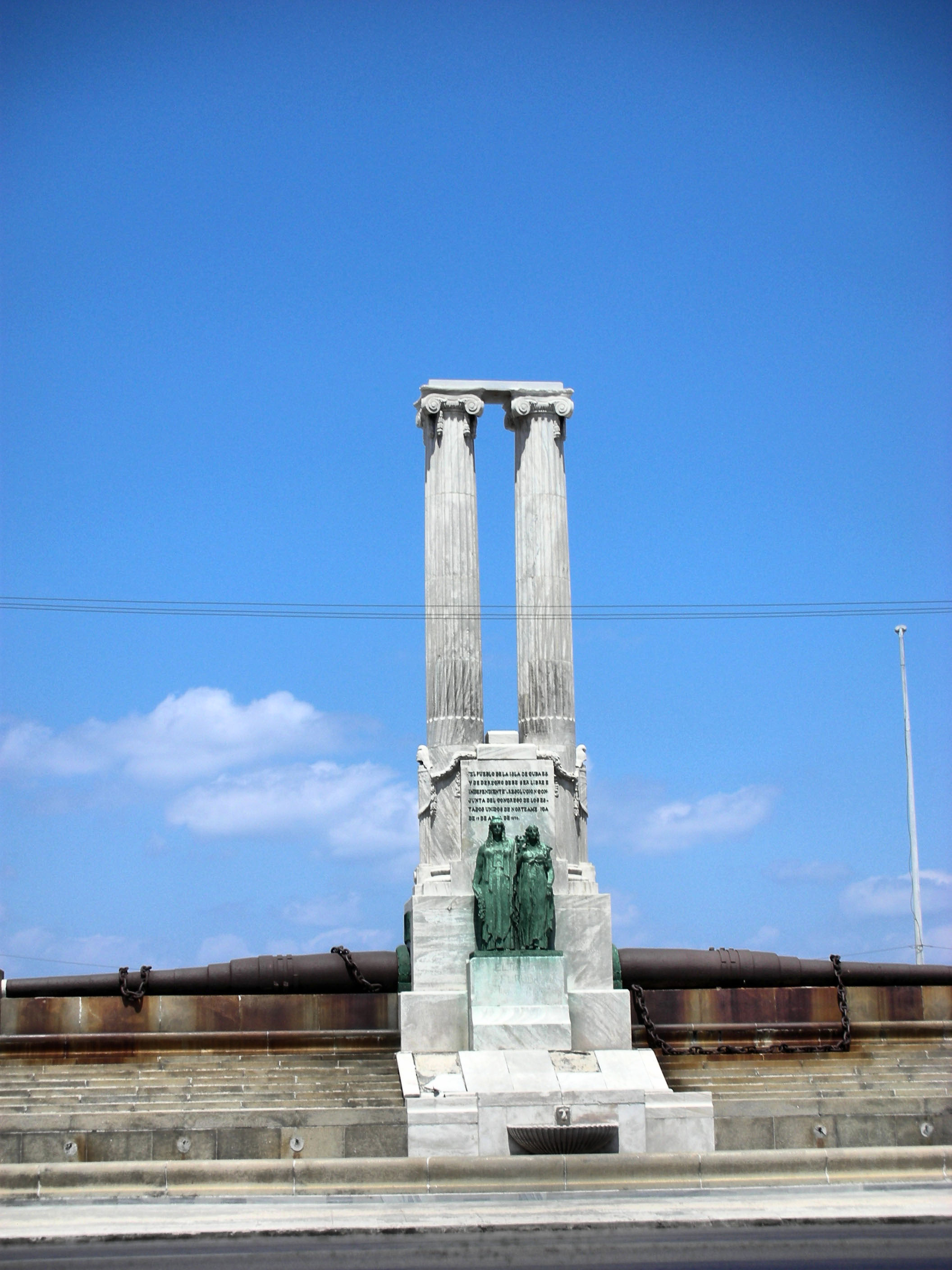 Monumento al Maine - 2008